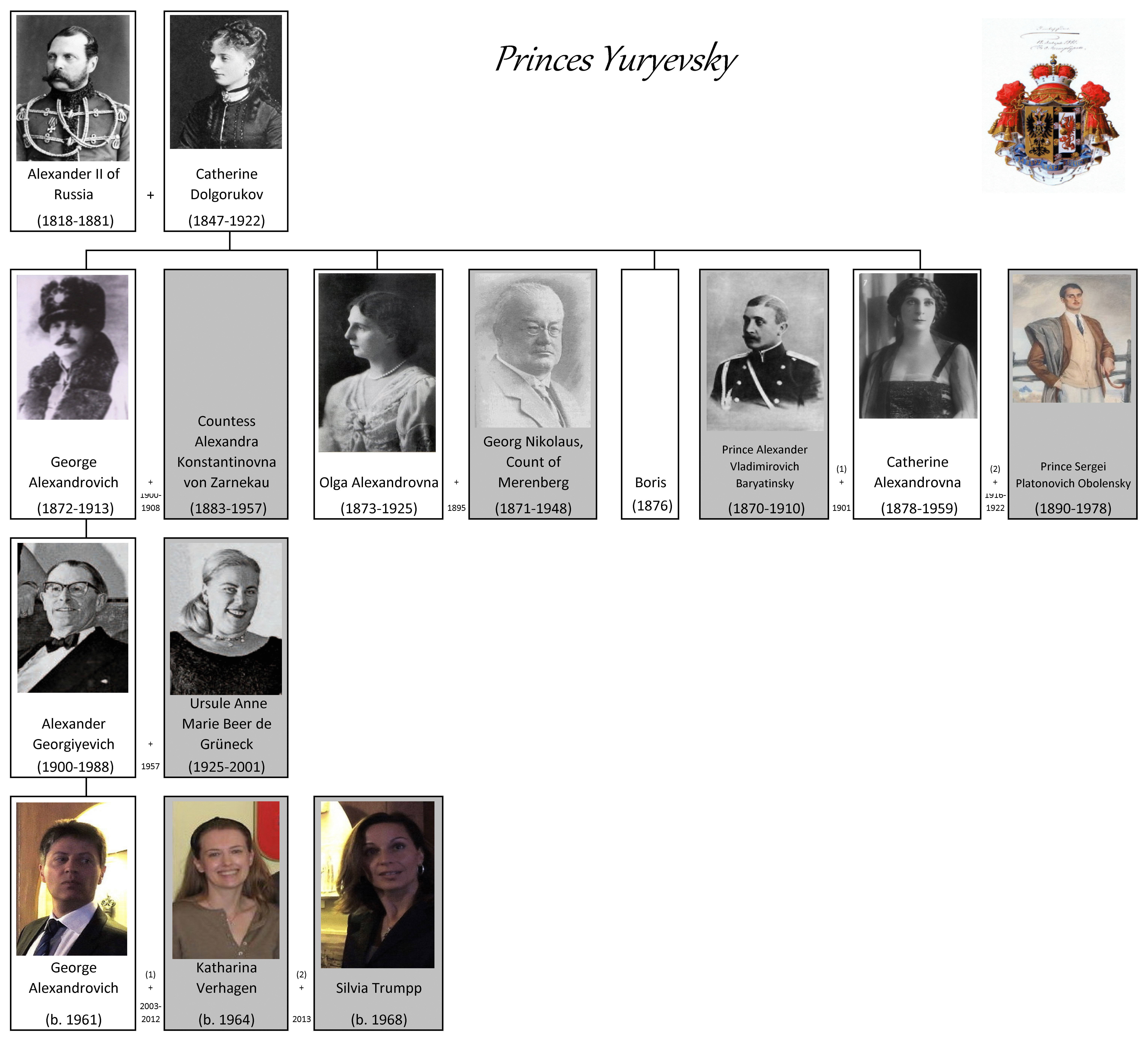 Родословная князей Юрьевских